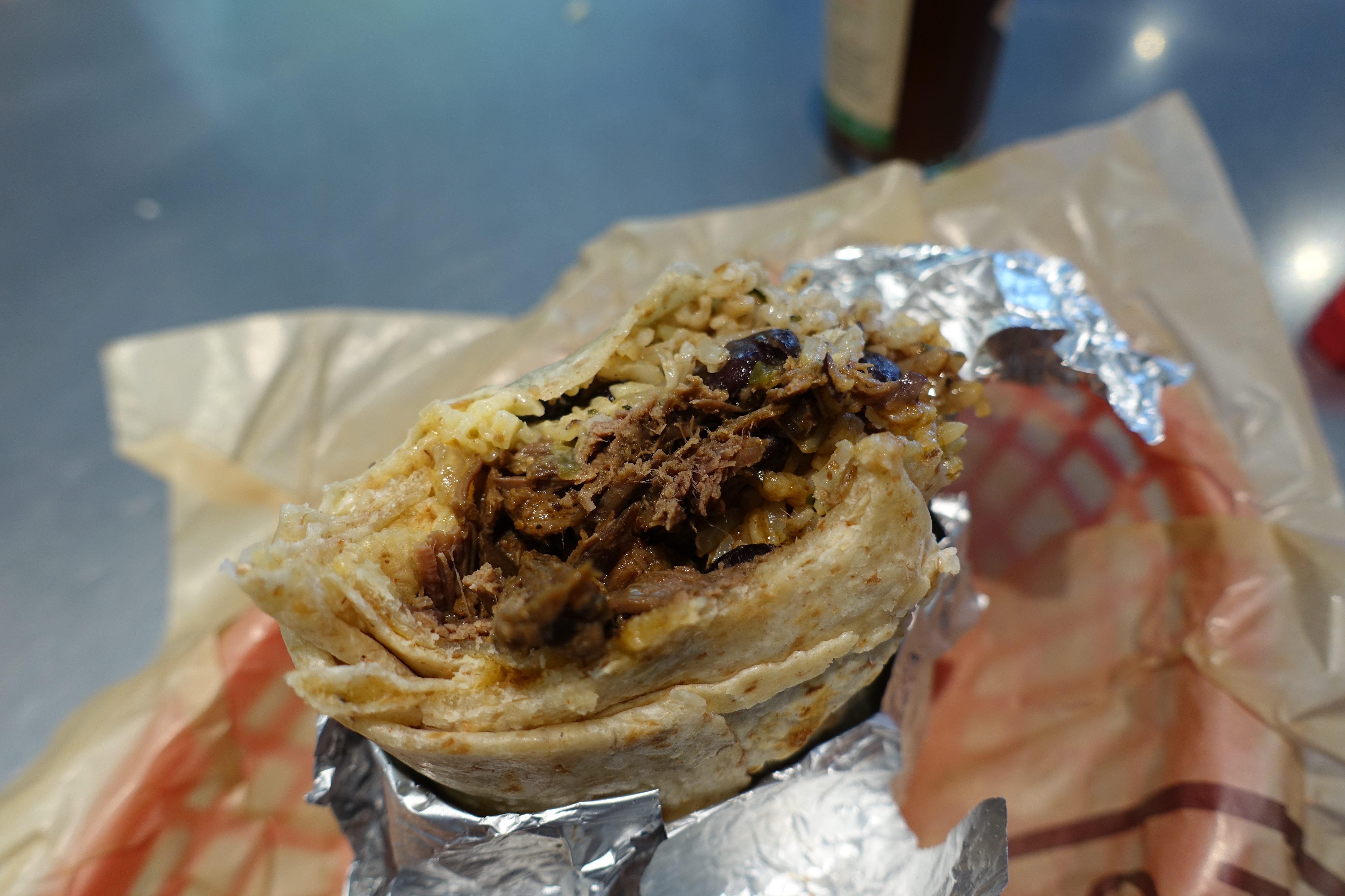 Burrito @ Chipotle @ Saint-Germain-des-Près @ Paris